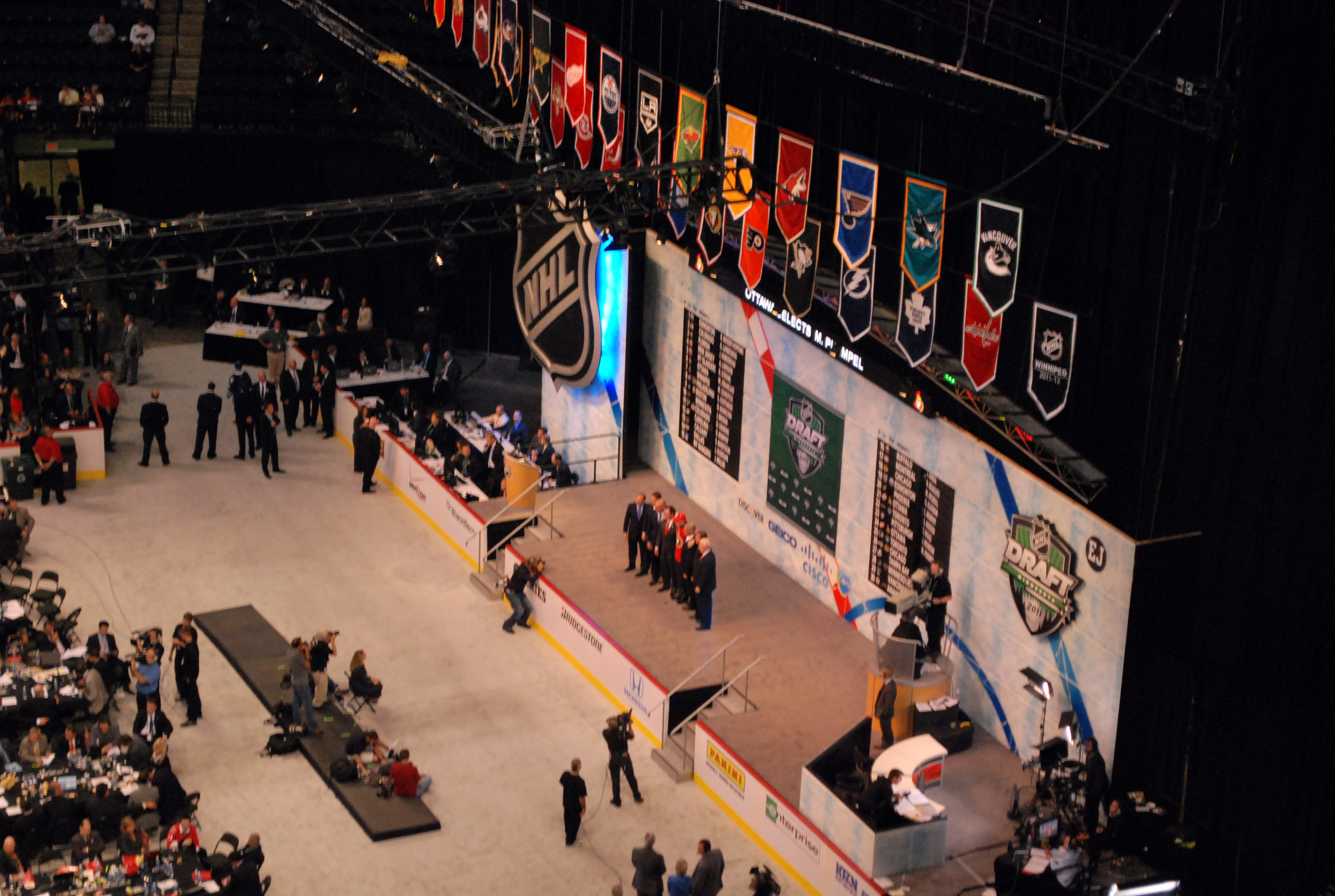 24 Matt Puempel Photo